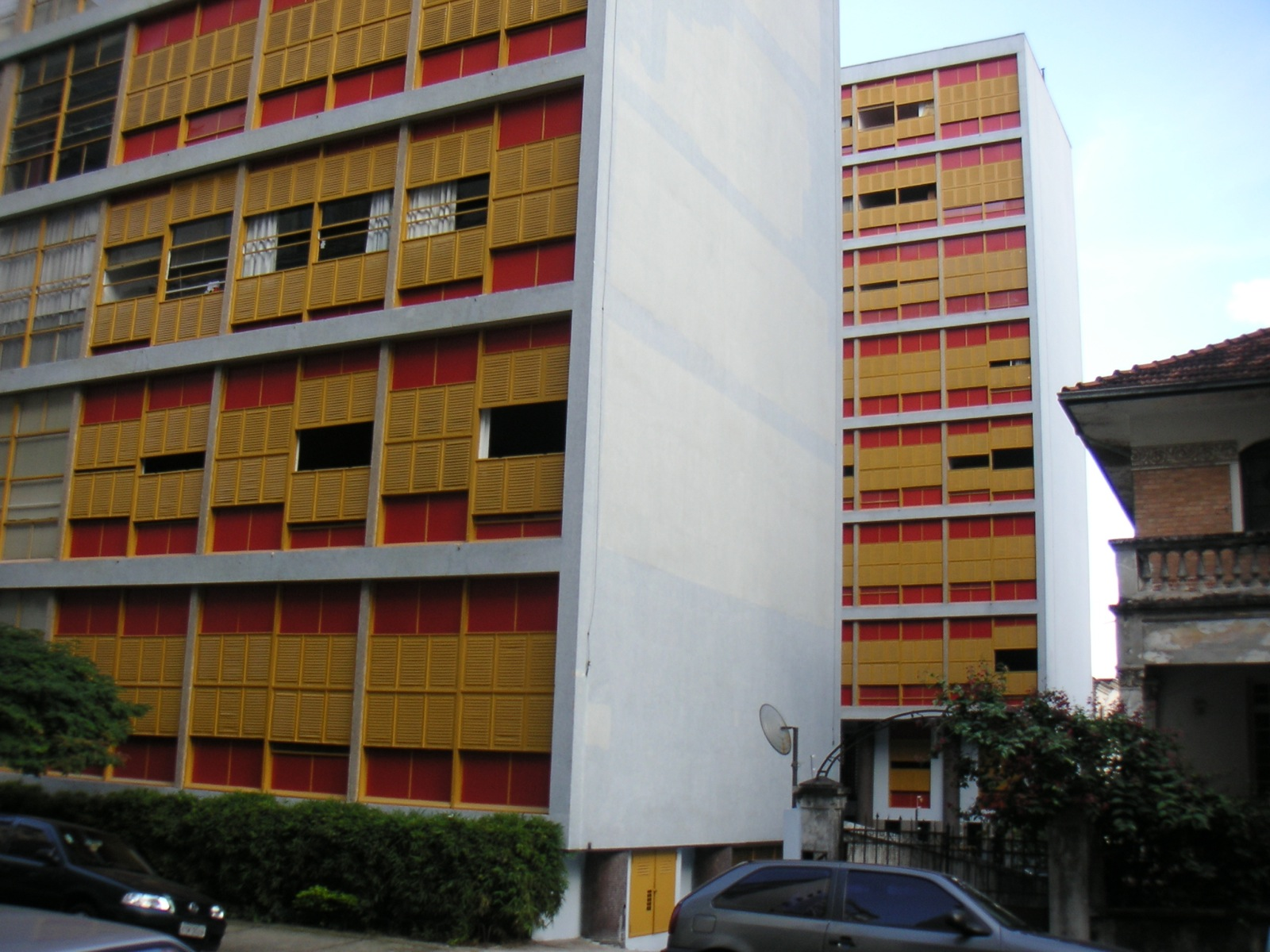 Modernist apartment building Edificio Louveira by Brazilian architect João Batista Vilanova Artigas. São Paulo, Brazil.